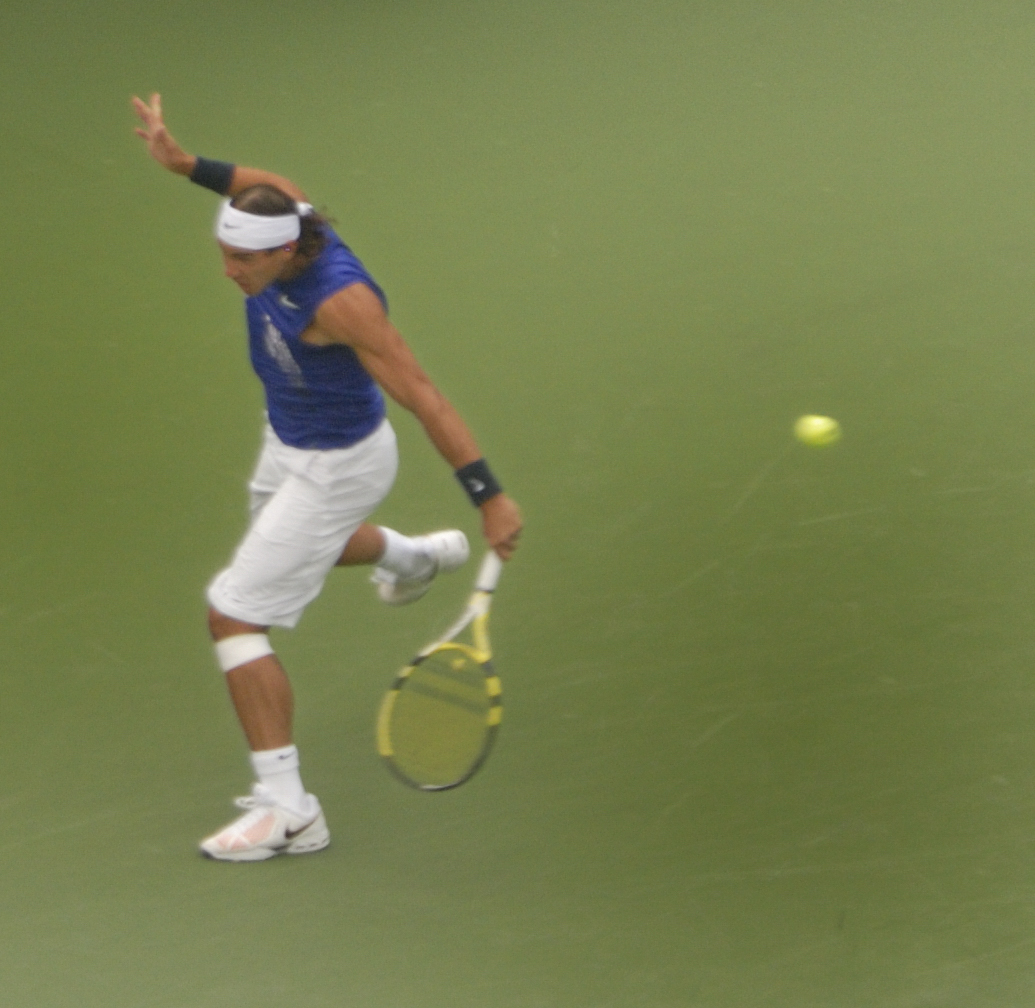 Rafael Nadal à l'US Open 2008